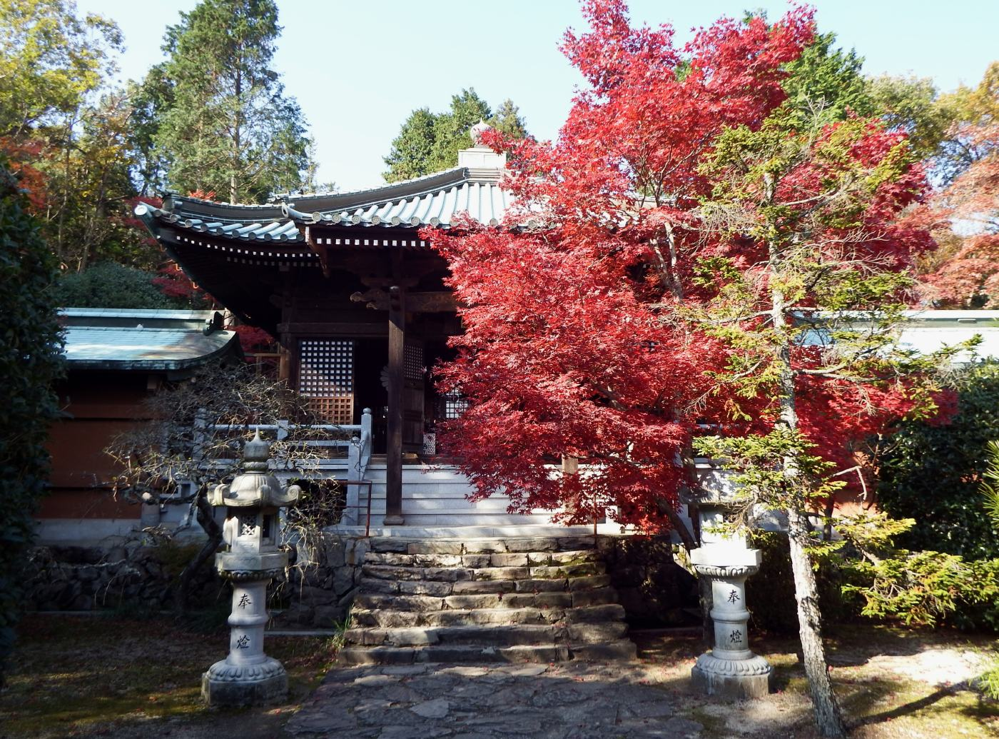 根香寺の本堂